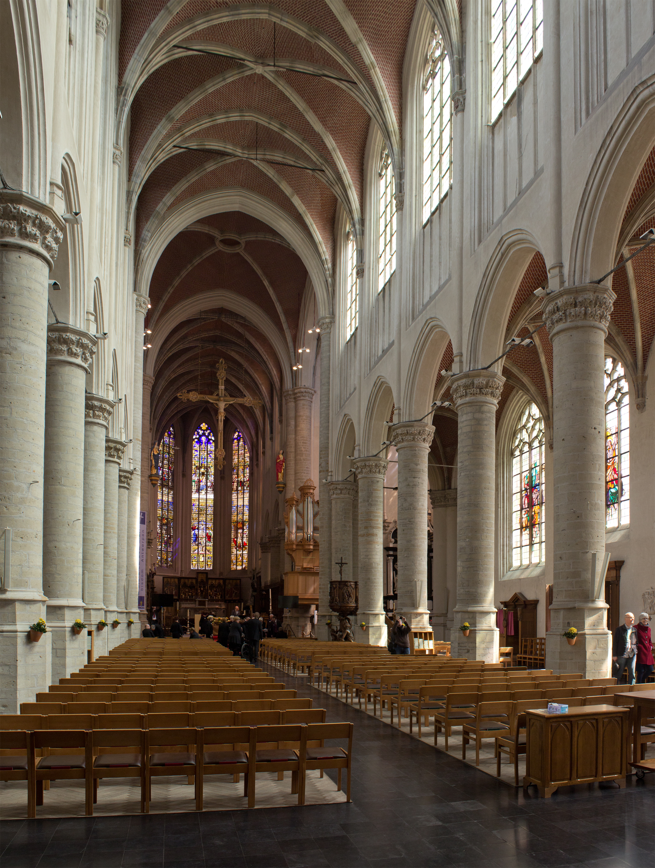 Hoogstraten. Decanale kerk Sint-CatharinaHoogstraten. Decanale kerk Sint-Catharina